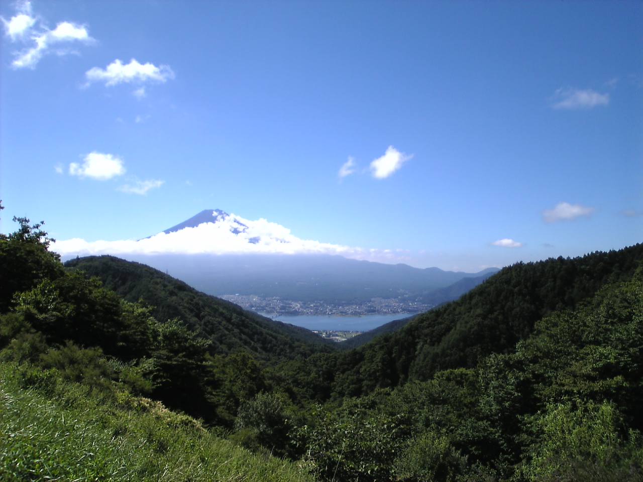 新御坂峠からの眺望